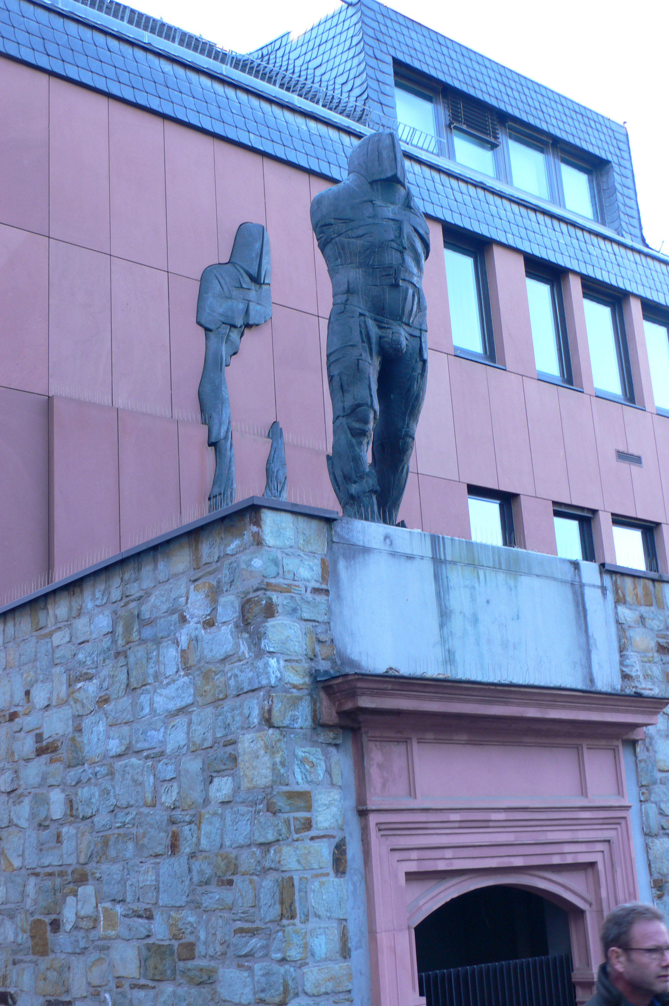 "Mann vom Castrum" von Eberhard Linke (1986), Mainz, Breidenbacherstraße 12